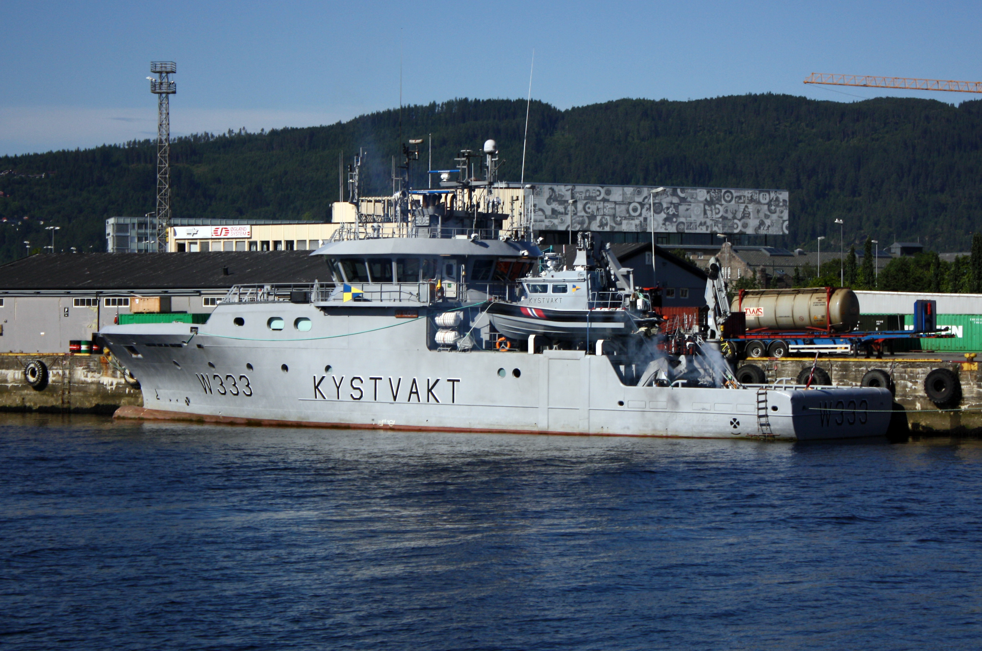 Kystvaktens Njord på besøk i Trondheim havn.